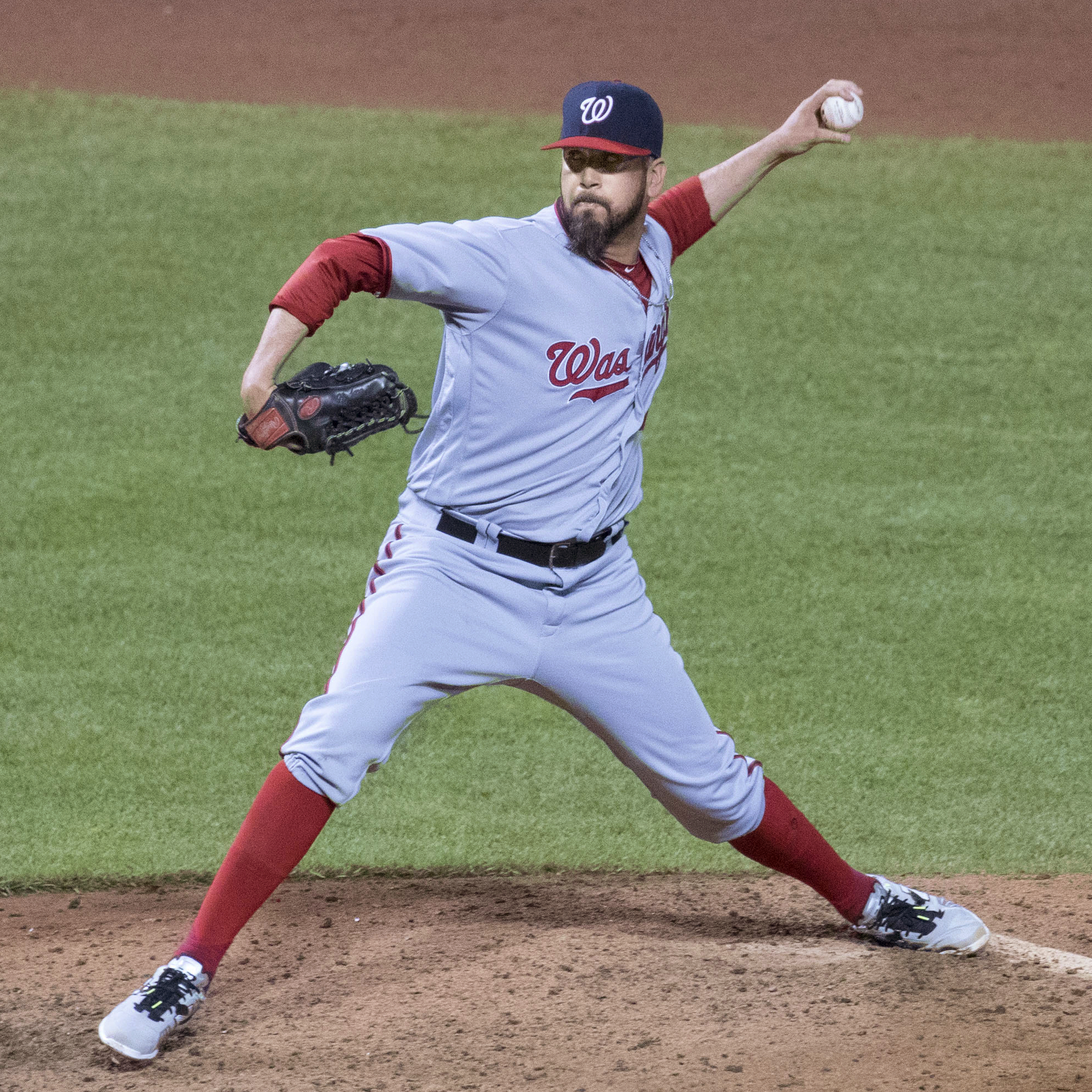 Óliver Pérez